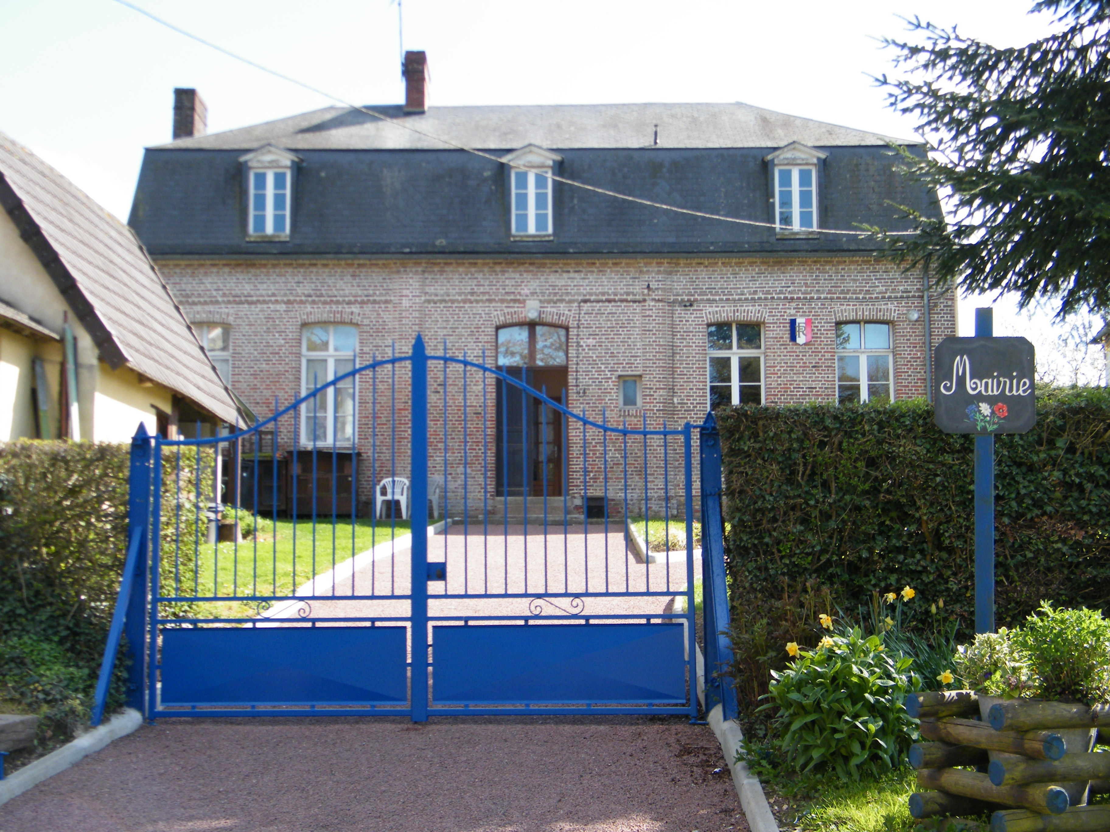 La mairie.